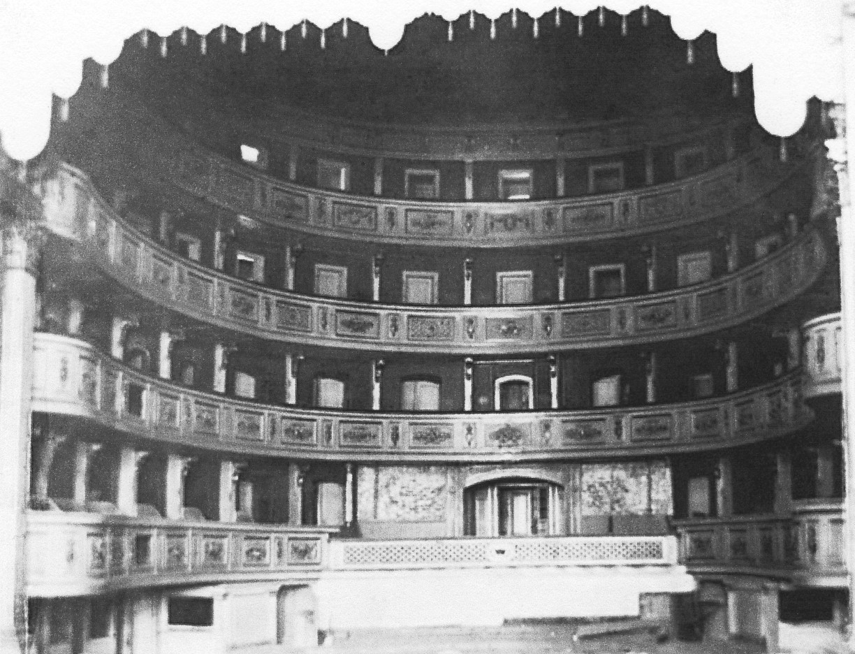 Gustavianska operan i Stockholm, salongen